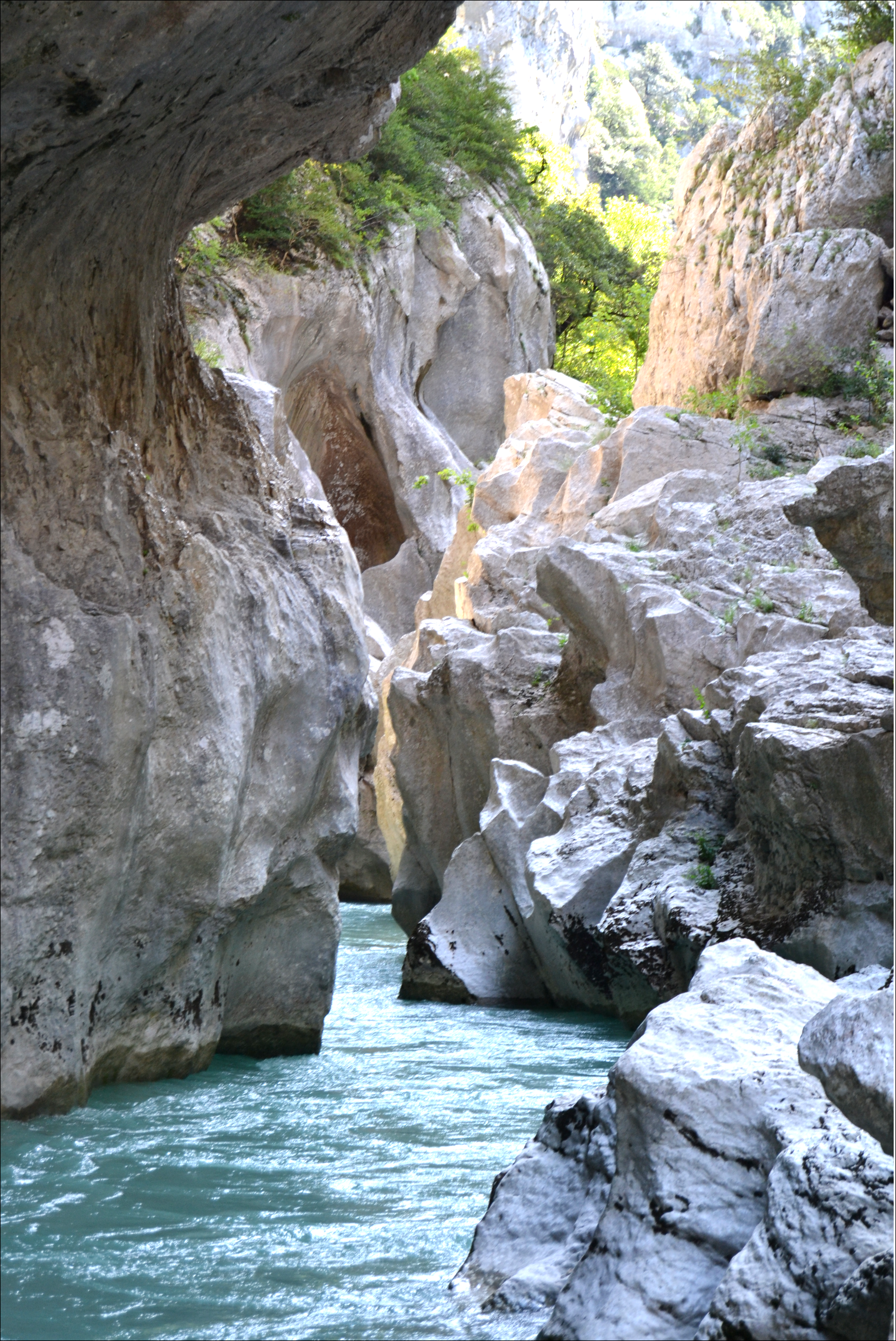 Gòrgas de Verdon - Stix - 06.2013